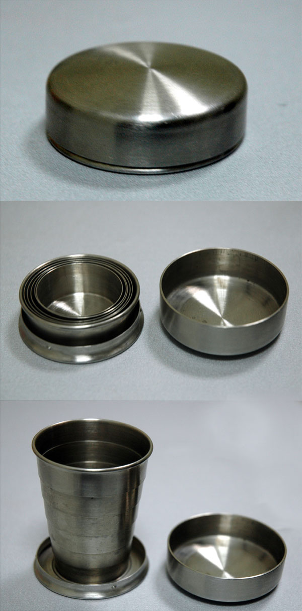 Раскладной стакан